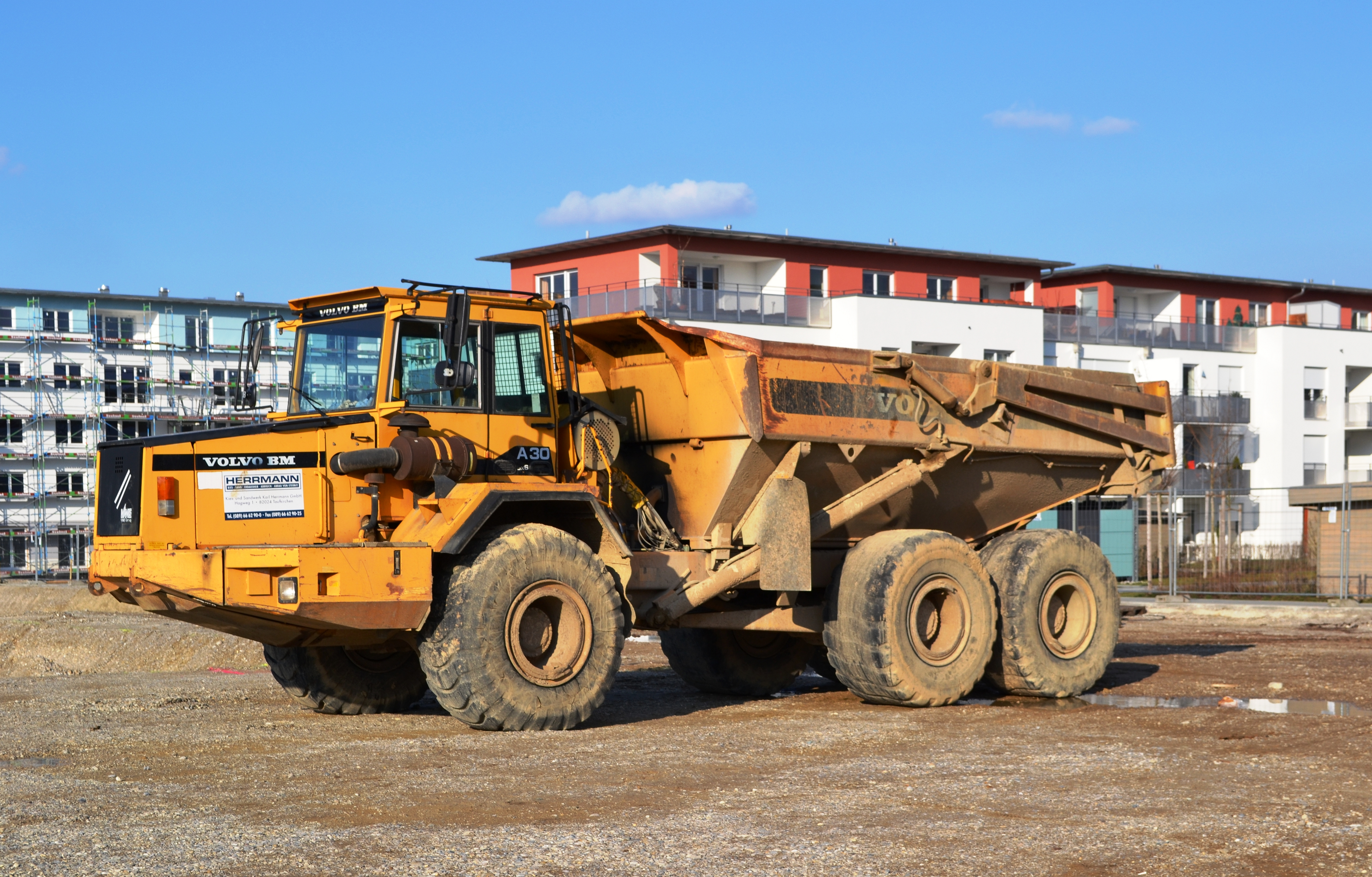 Volvo BM A30 (6x6) Kipper.